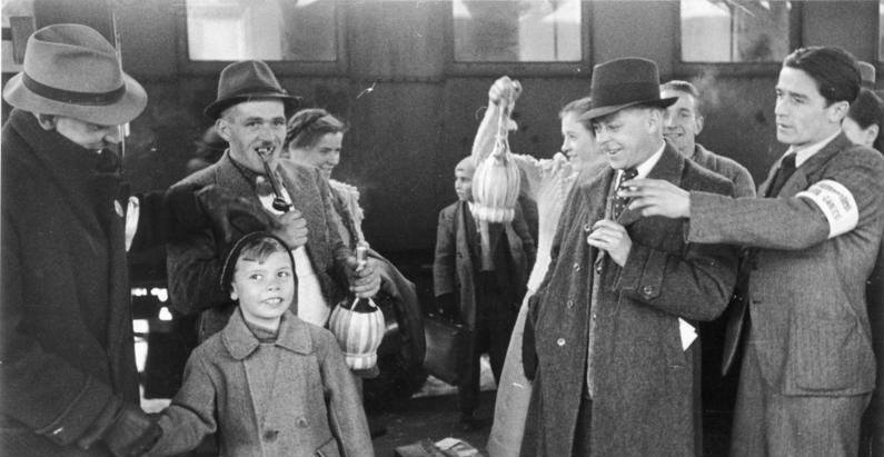 Innsbruck Umsiedlung der Südtiroler: Ankunft der 1. Südtiroler auf dem Bahnhof